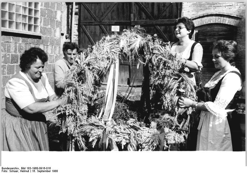 Otzbach, Flechten einer Erntekrone ADN-ZB Schaar 16.9.88 Suhl: Alte Tradition gepflegt- Mit leuchtend bunten Strohblumen, Schafgarbe und Silberdisteln von den Hängen der Rhön haben die Bäuerinnen der LPG Dermbach ihre prunkvolle Erntekrone geschmückt. Nach tagelanger Arbeit gehörte das Prunkstück jüngst zu den vielbewunderten Kostbarkeiten auf dem Erntefest der kleinen Gemeinde Otzbach im Bezirk Suhl.